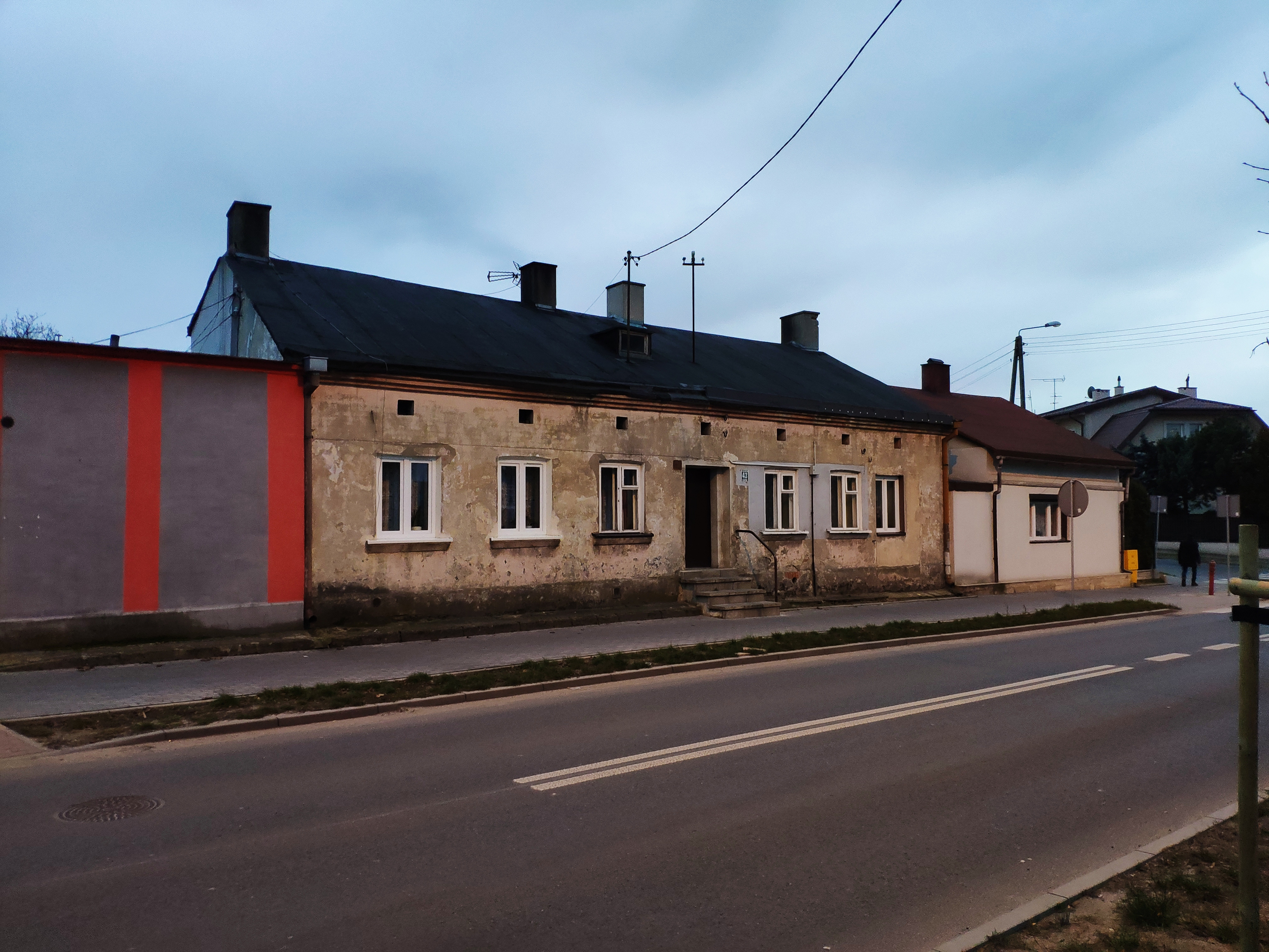 Dom, w którym urodził się i wychował Jan Olejniczak